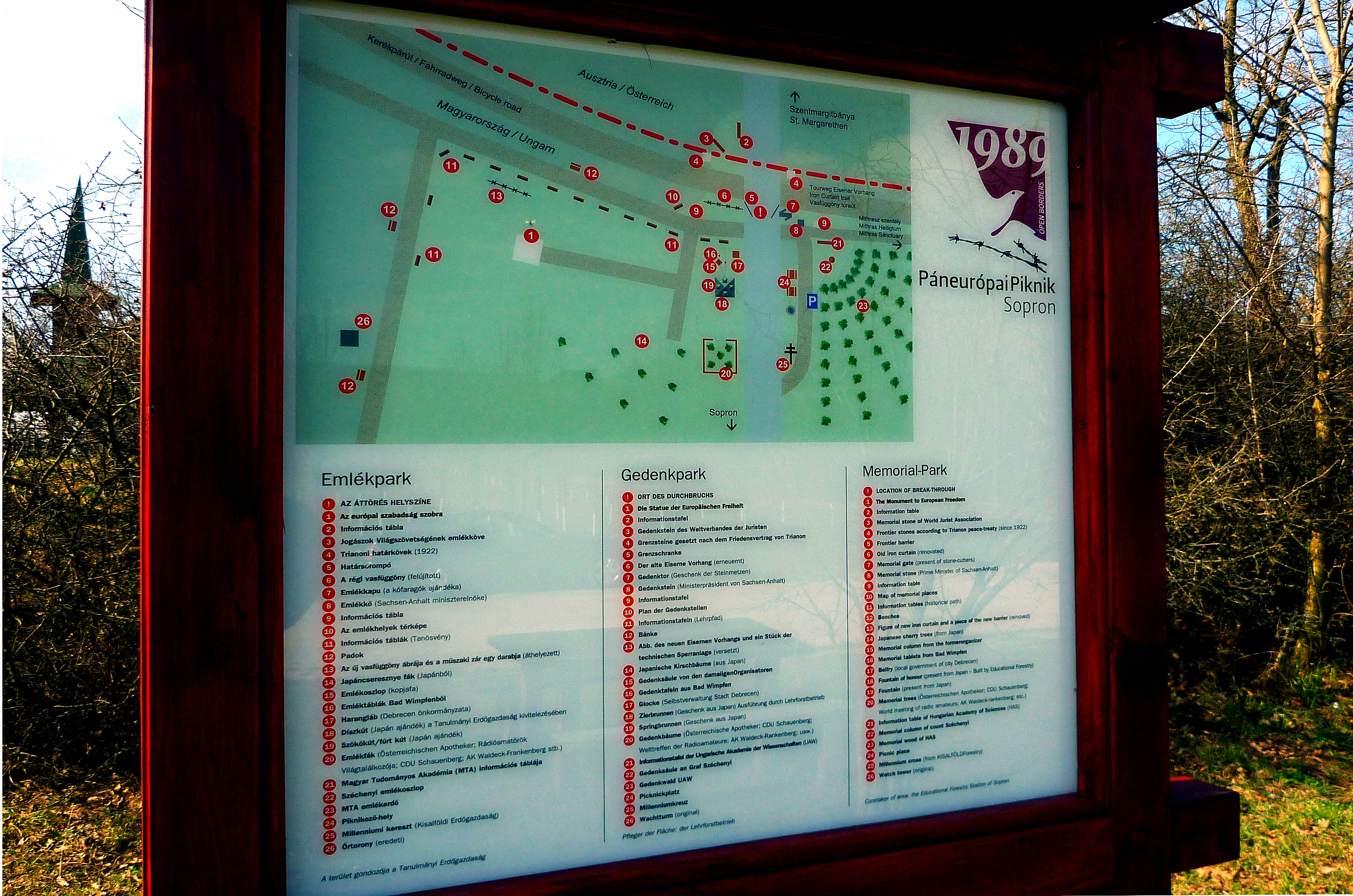 Páneurópai Piknik Emlékhely